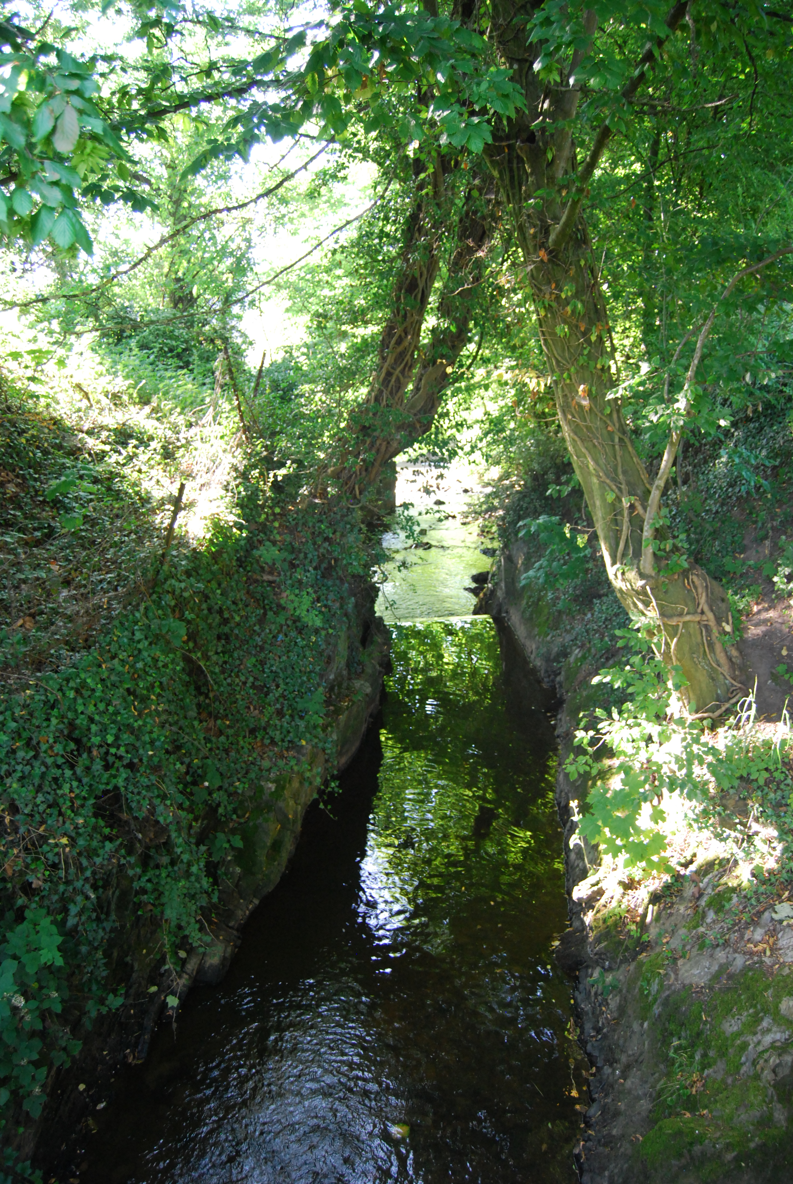 Canal creusé au Xème siècle permettant de relier l'Oise au Gland et de former ainsi l'Ile-Notre-Dame d'Hirson